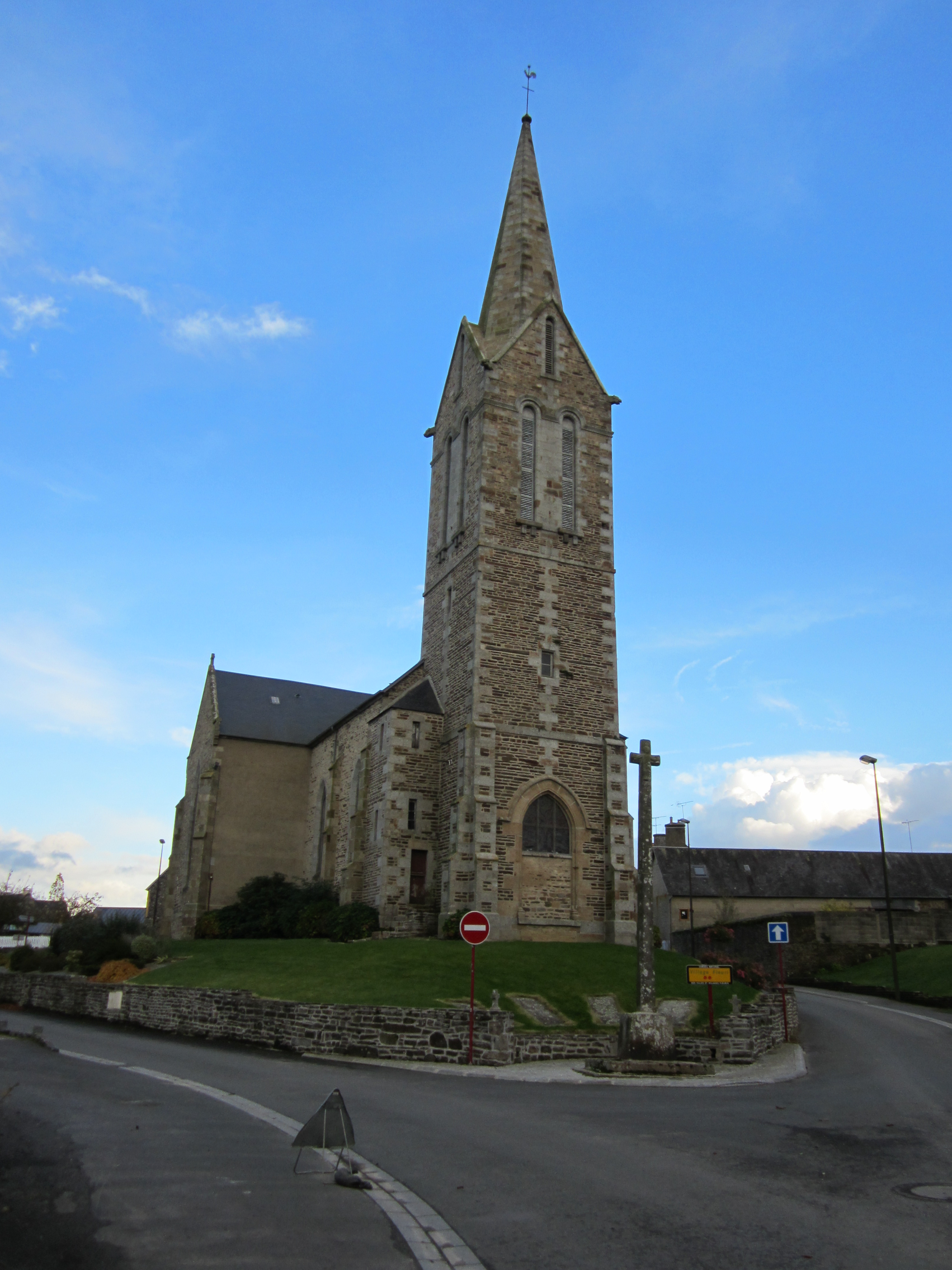 Saint-Laurent-de-Terregatte